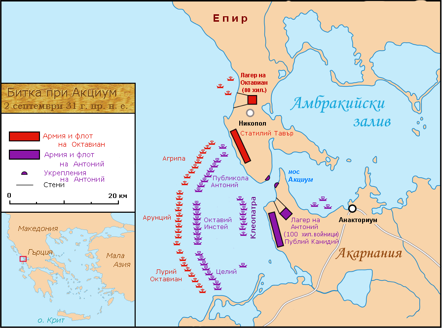 Битка при нос Акциум - 31 г. пр. н. е.